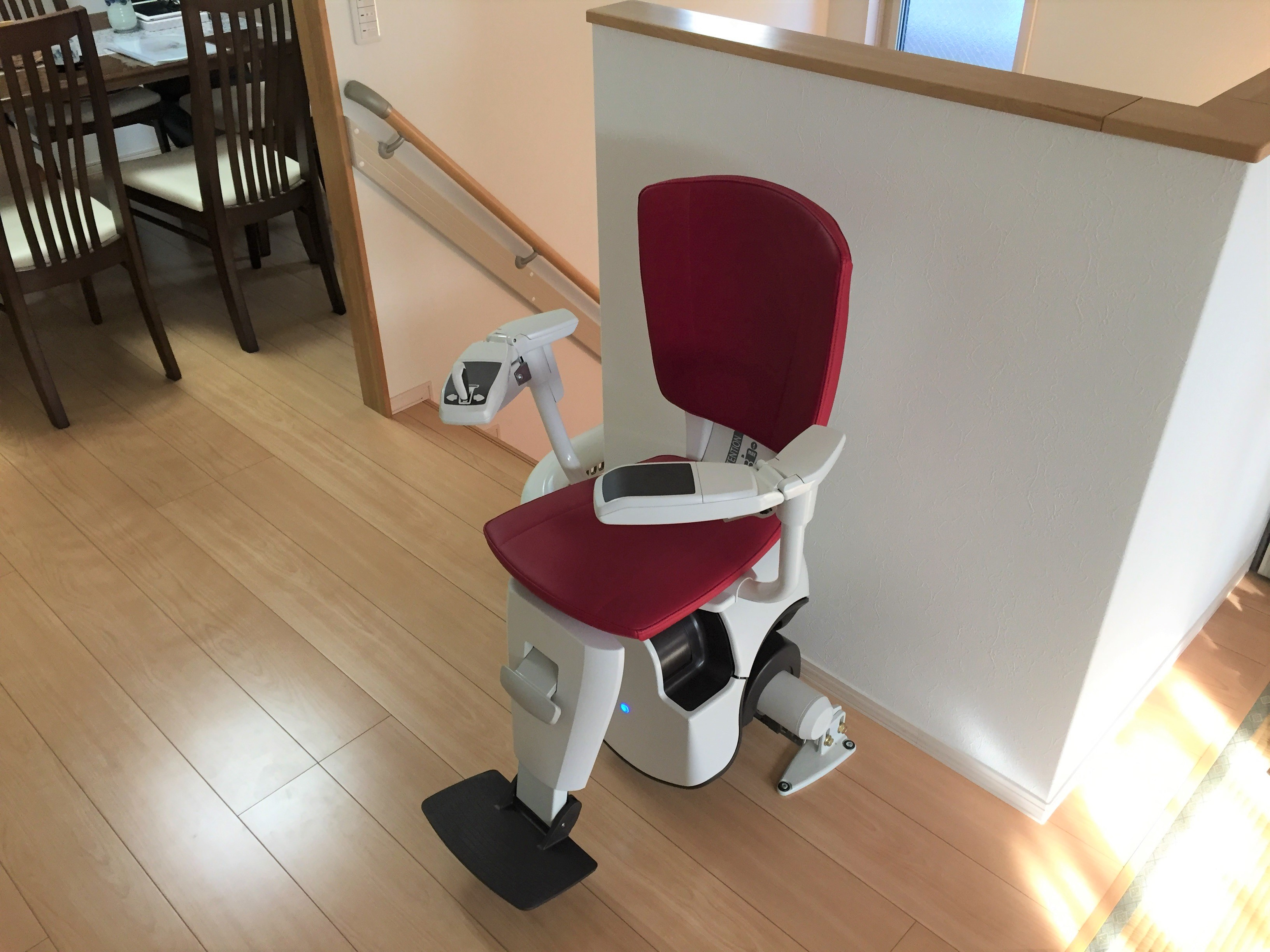 階段昇降機-設置例